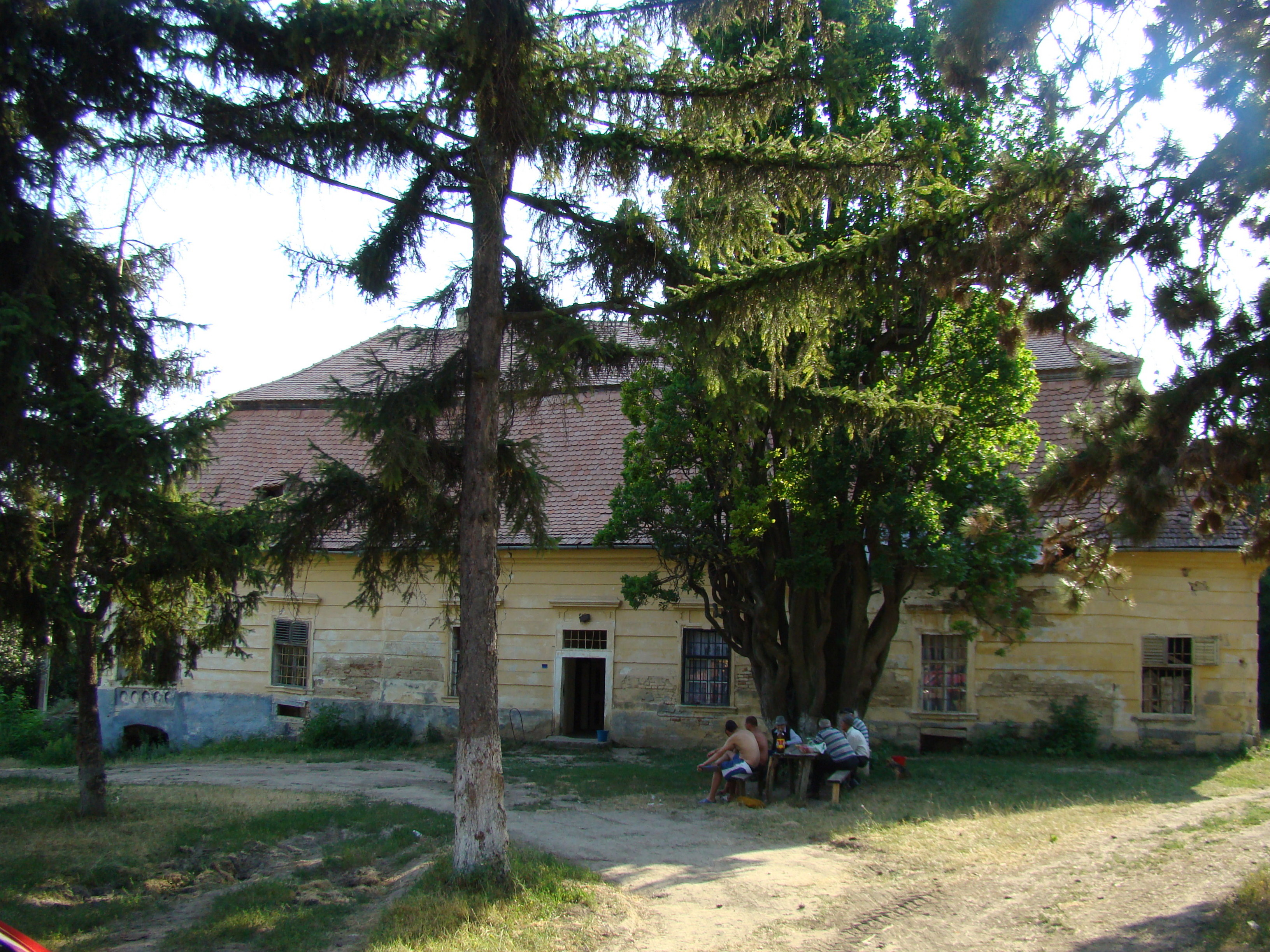 Castelul Teleki, sat COMLOD; comuna MILAŞ